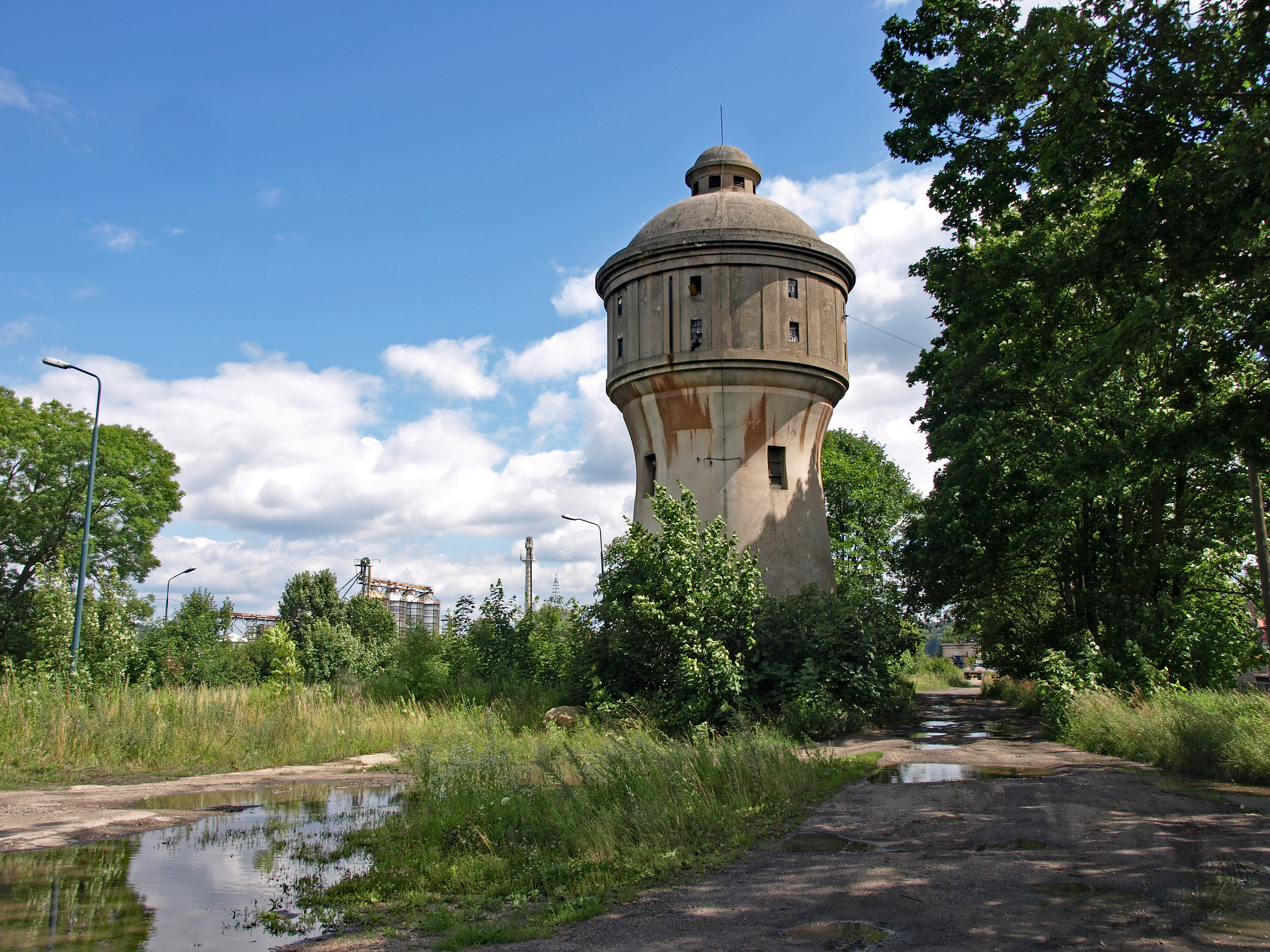 Wasserturm am Bahnhof Löwenberg/Lwówek Śląski